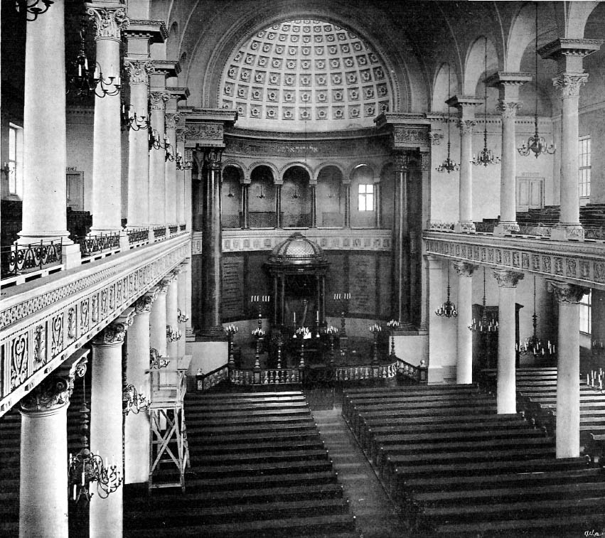 Велика синагога у Варшаві. Архітектор Леандро Марконі (1834-1919).